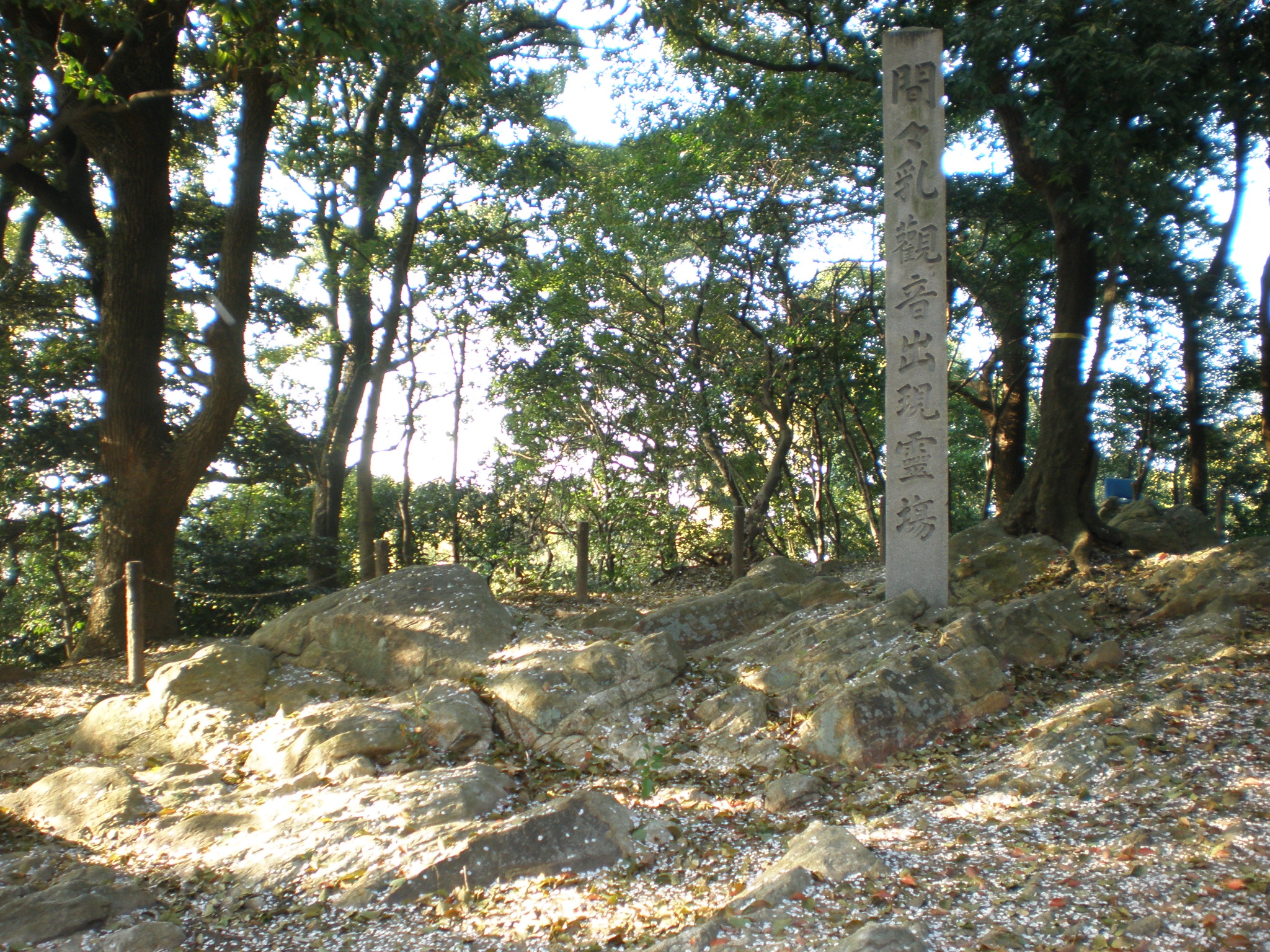 愛知県小牧市の小牧山にある観音洞（かんのんぼら）